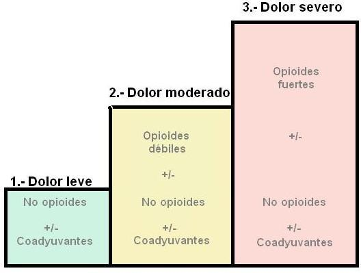 Escala analgésica de la OMS